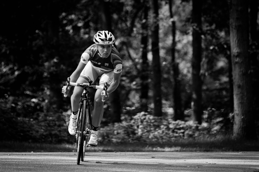 Annemiek van Vleuten wereldbeker winnares 2011